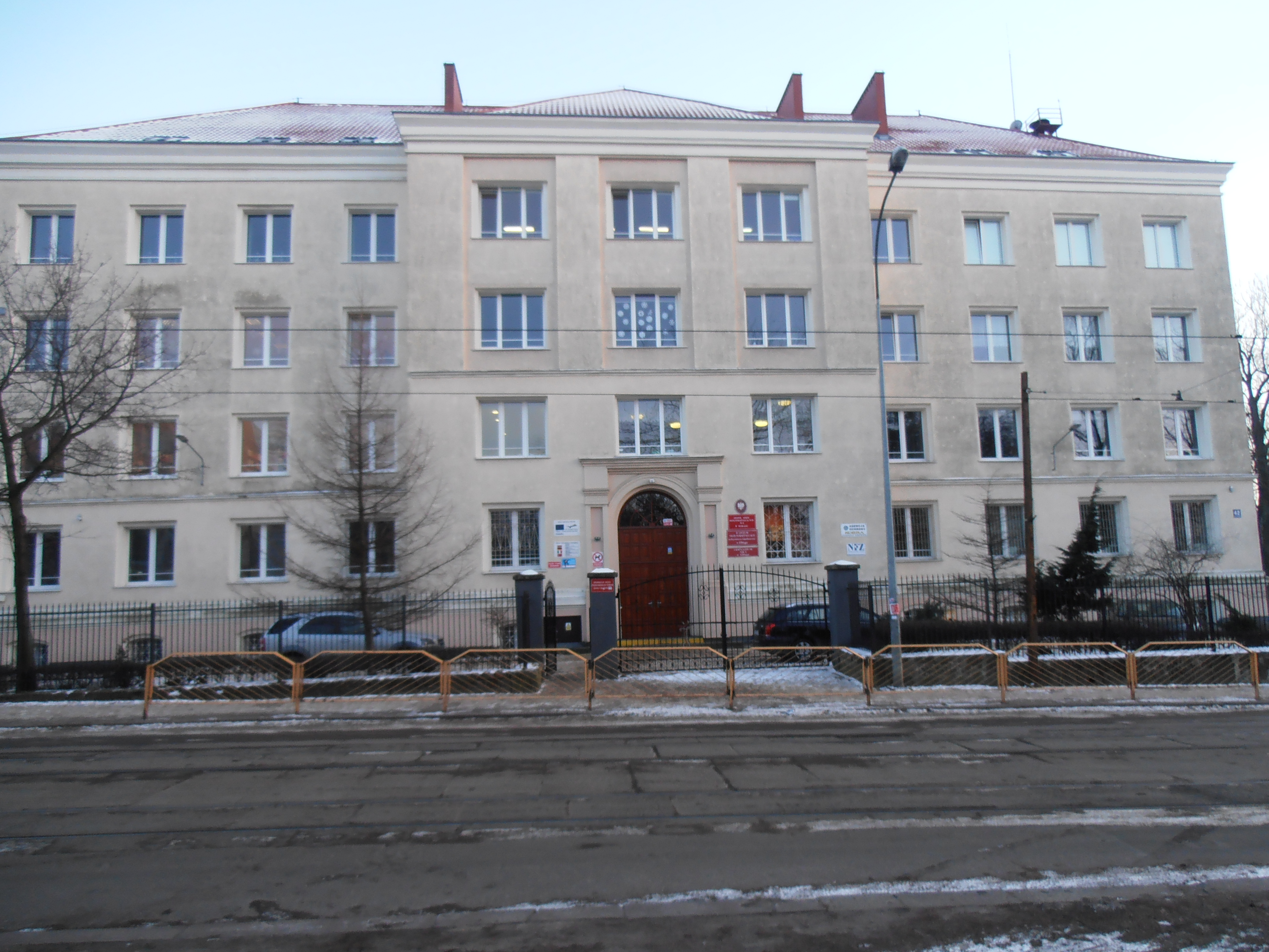 II Liceum Ogólnokształcące im. Kazimierza Jagiellończyka w Elblągu (21 stycznia 2014)